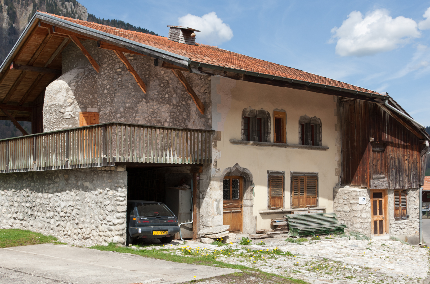 Maison des Comtes in Grandvillard